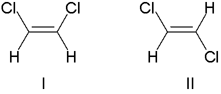 Dichloroethene